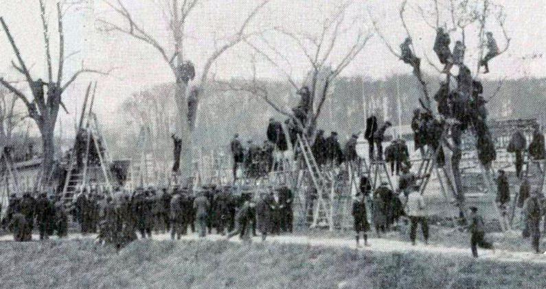 1912 (31 mars), public dans les arbres du Stade des Ponts Jumeaux lors de la finale du championnat.